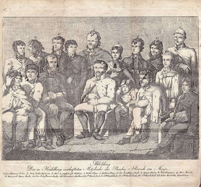 Kupferstich der Hölzerlipsbande nach ihrer Verhaftung 1811.